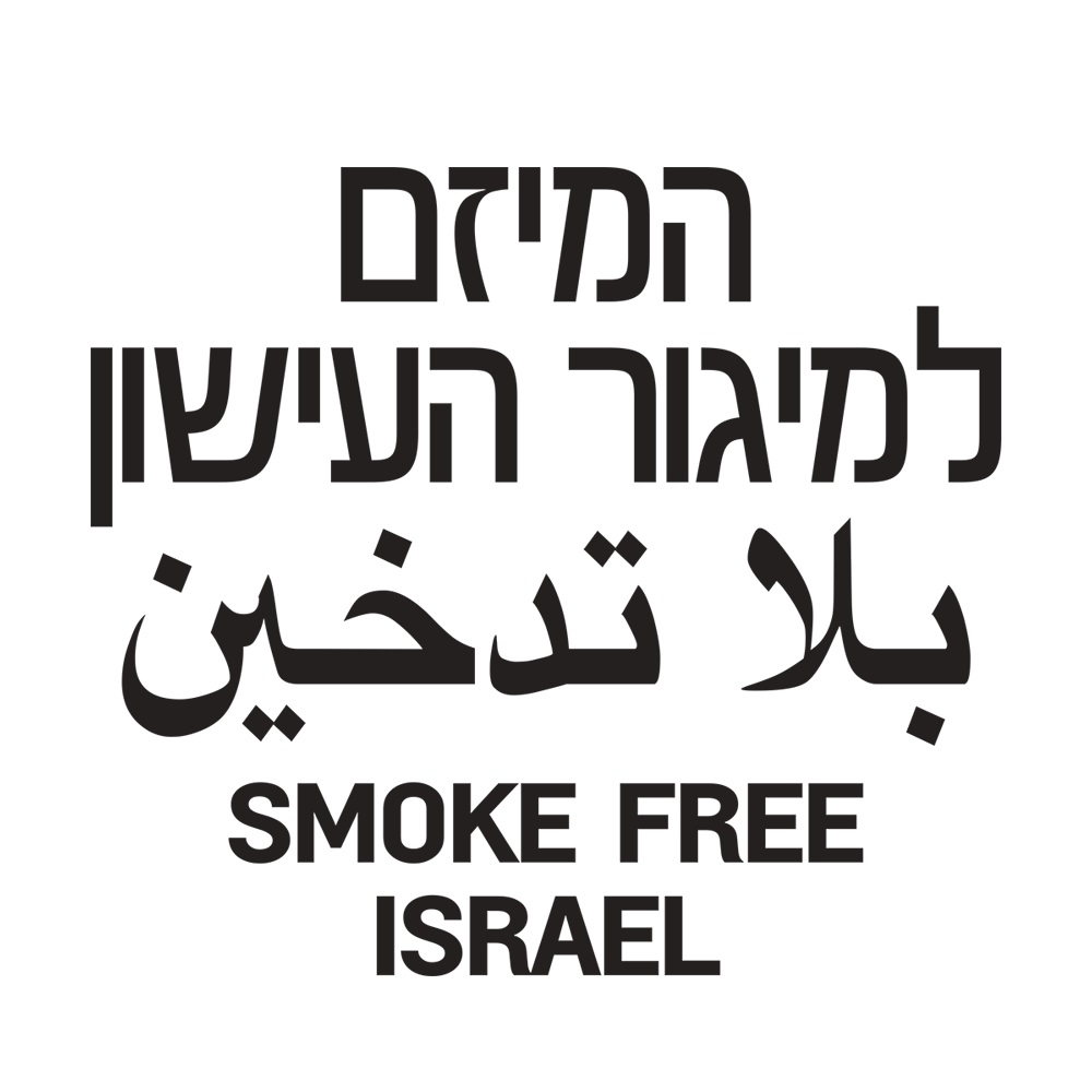 המיזם למיגור העישון